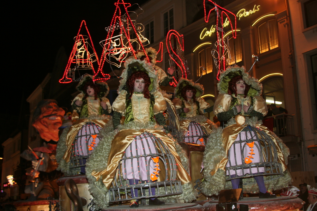 Aalst Carnaval stoet zondagavond Grote Markt